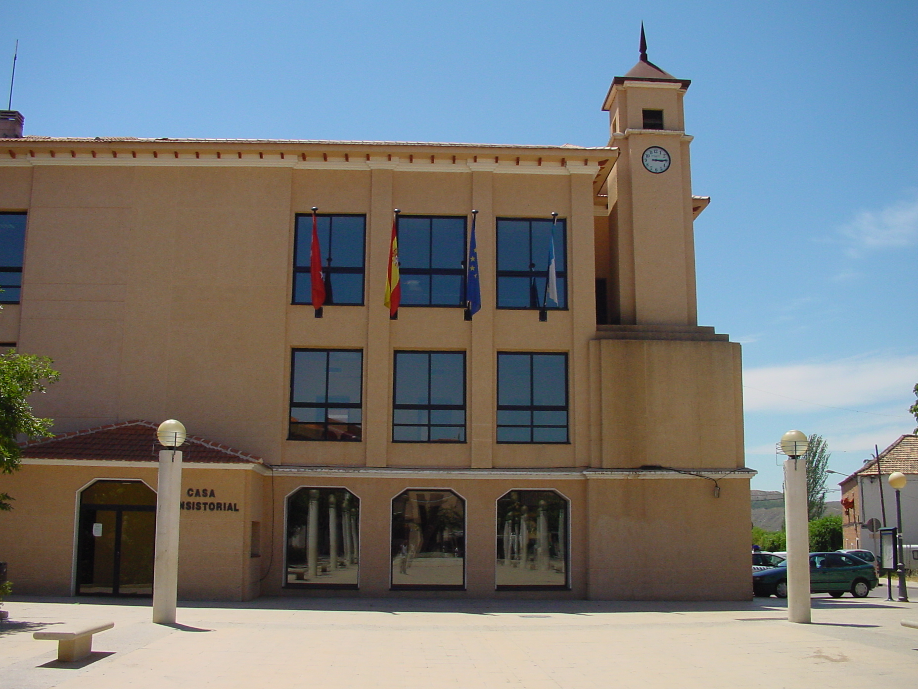 Ayuntamiento de Velilla de San Antonio.